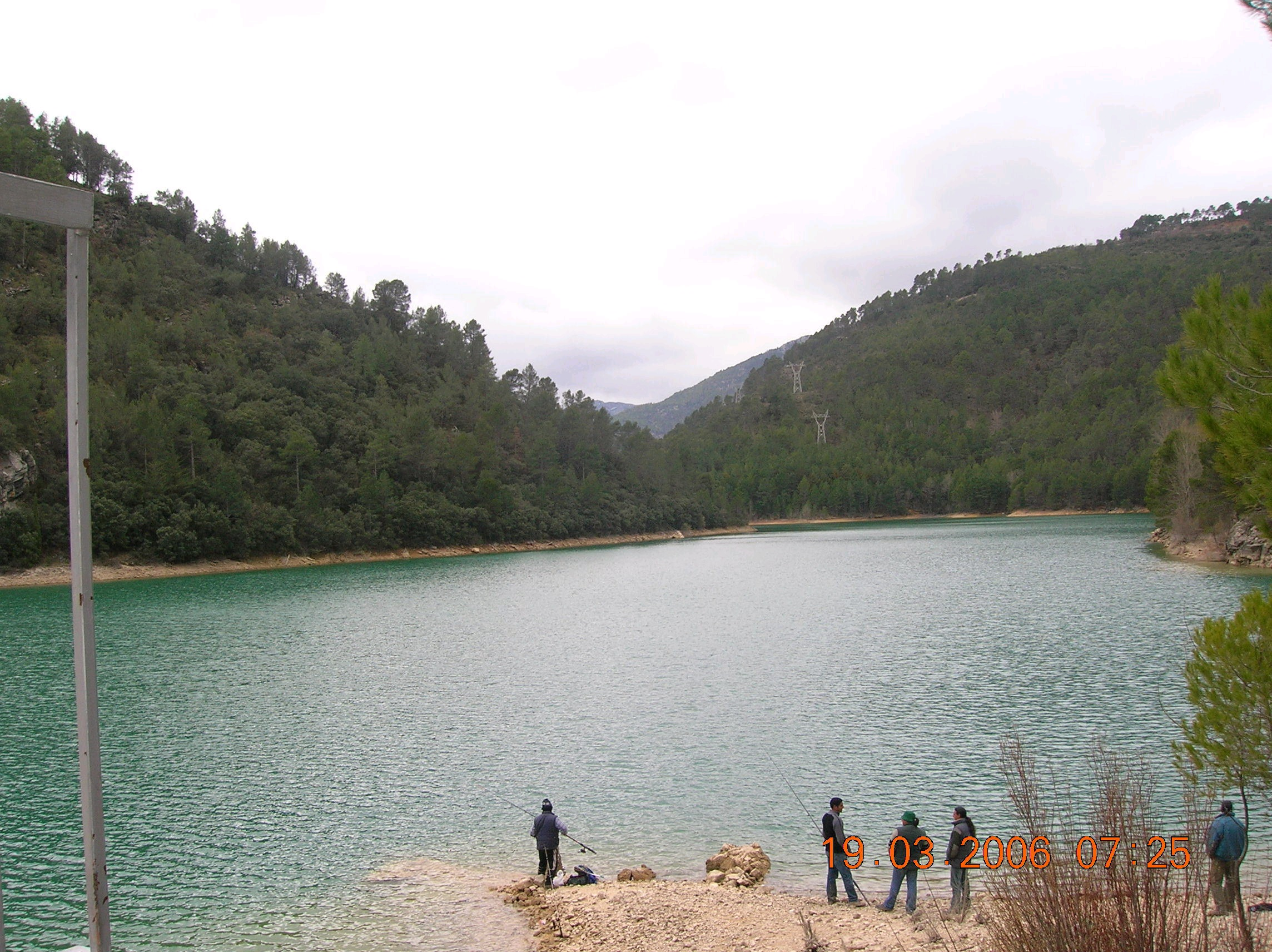 Embalse de Anchuricas del Río Segura a su paso por los alrededores de La Toba. Bajo sus aguas las antiguas Casicas del Río Segura.